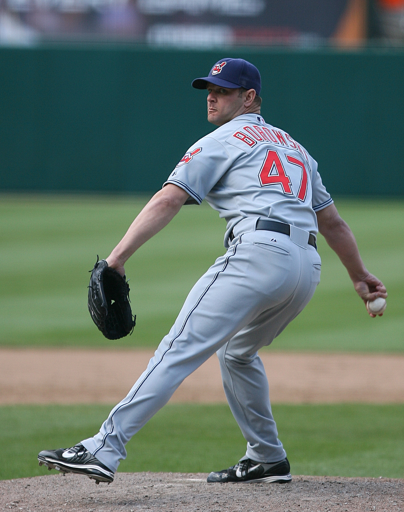 Joe Borowski